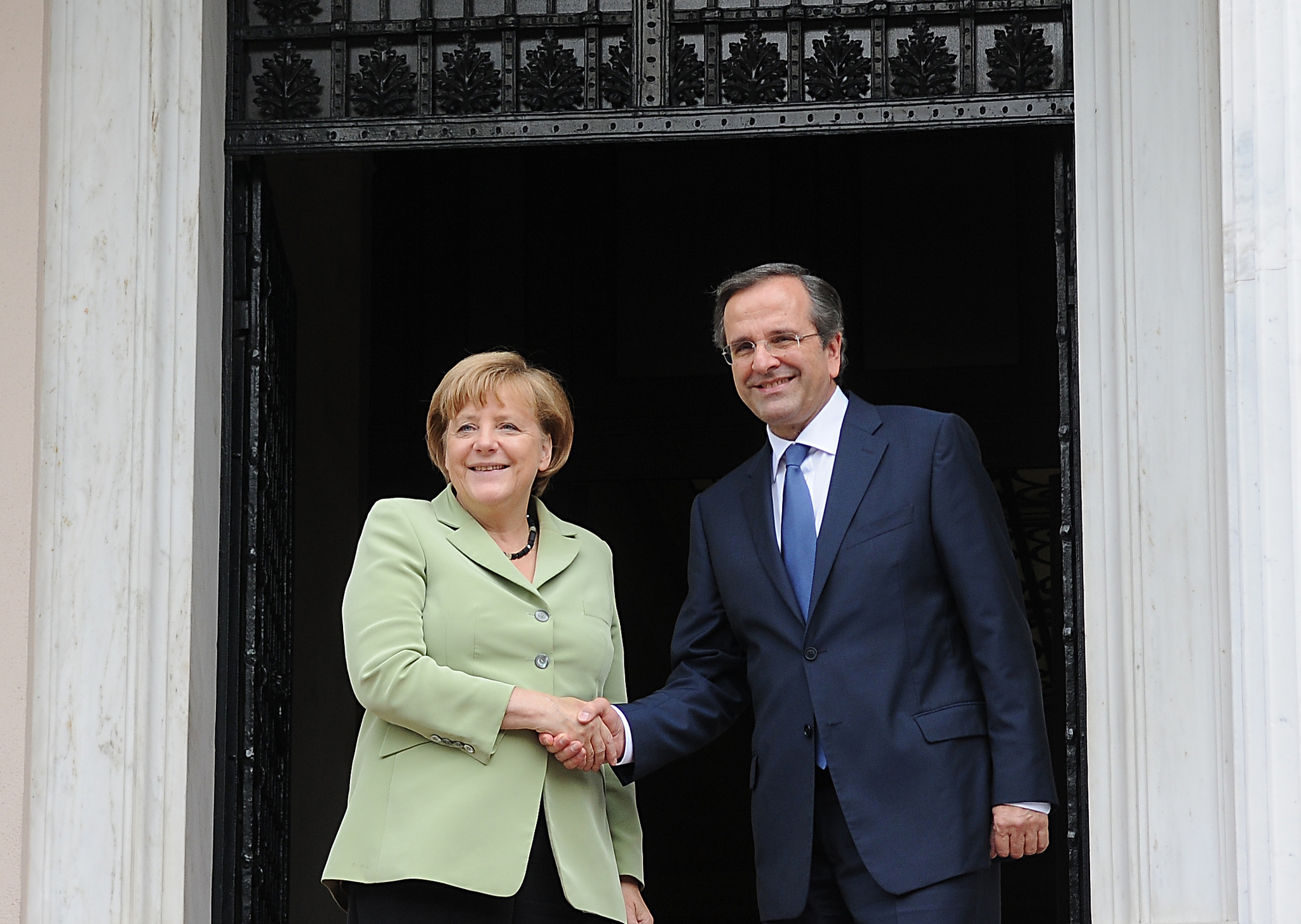 Αντώνης Σαμαράς - Angela Merkel - Επίσκεψη στην Αθήνα